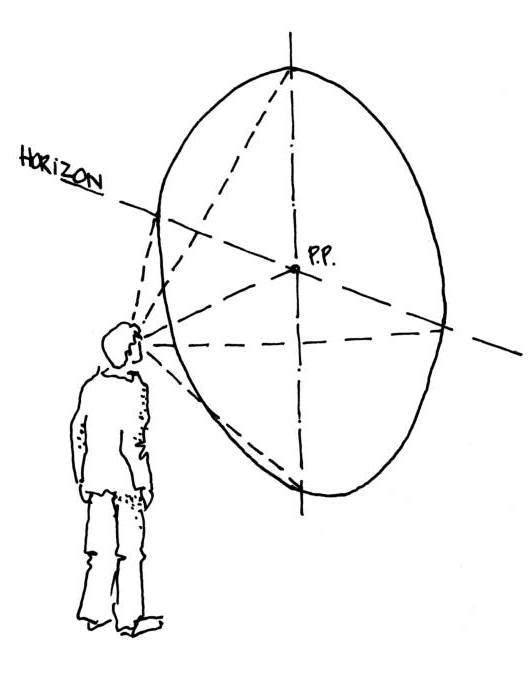 schéma de projection en perspective conique